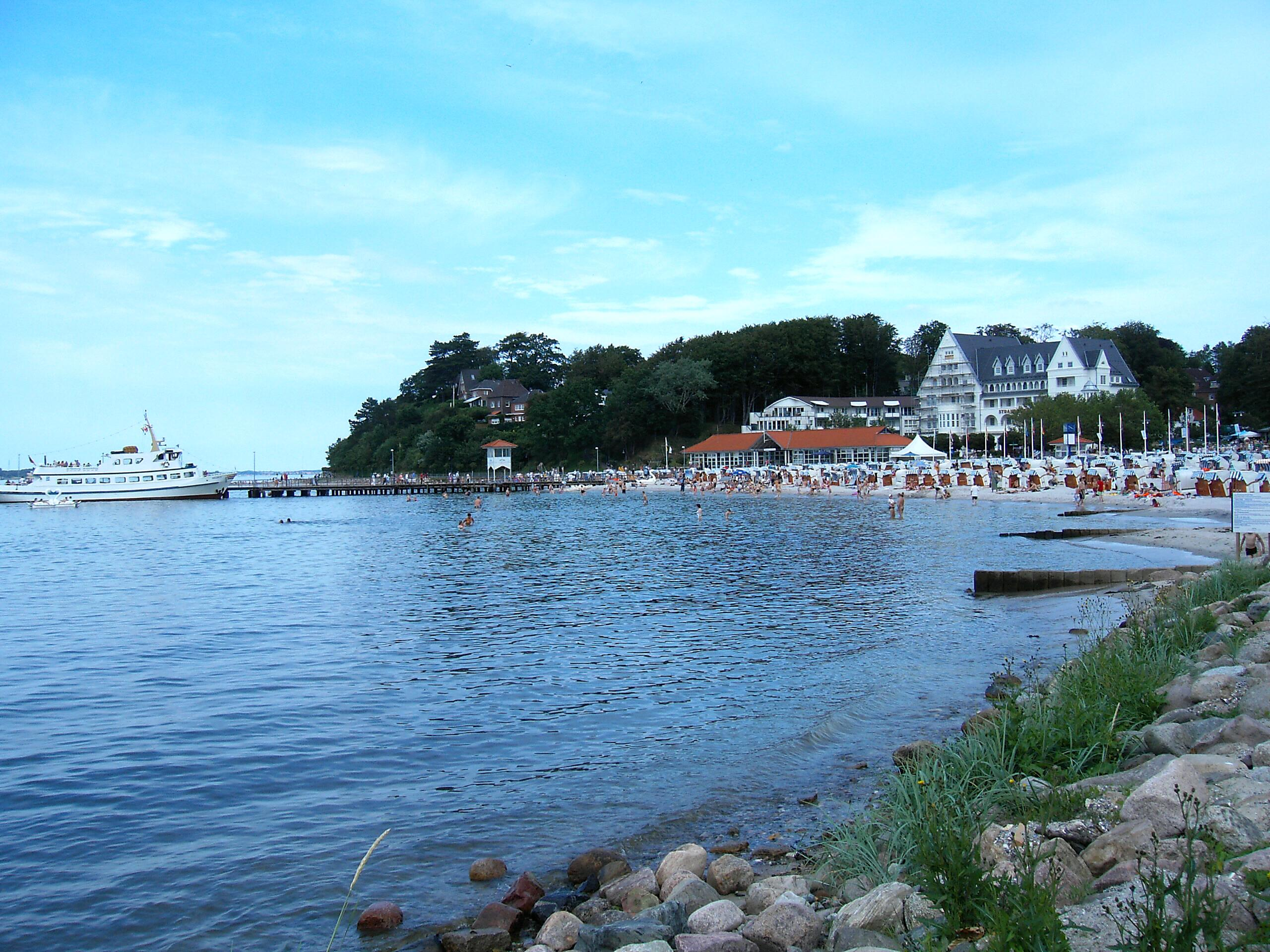 Strand in Glücksburg (Ostsee), Schleswig-Holstein